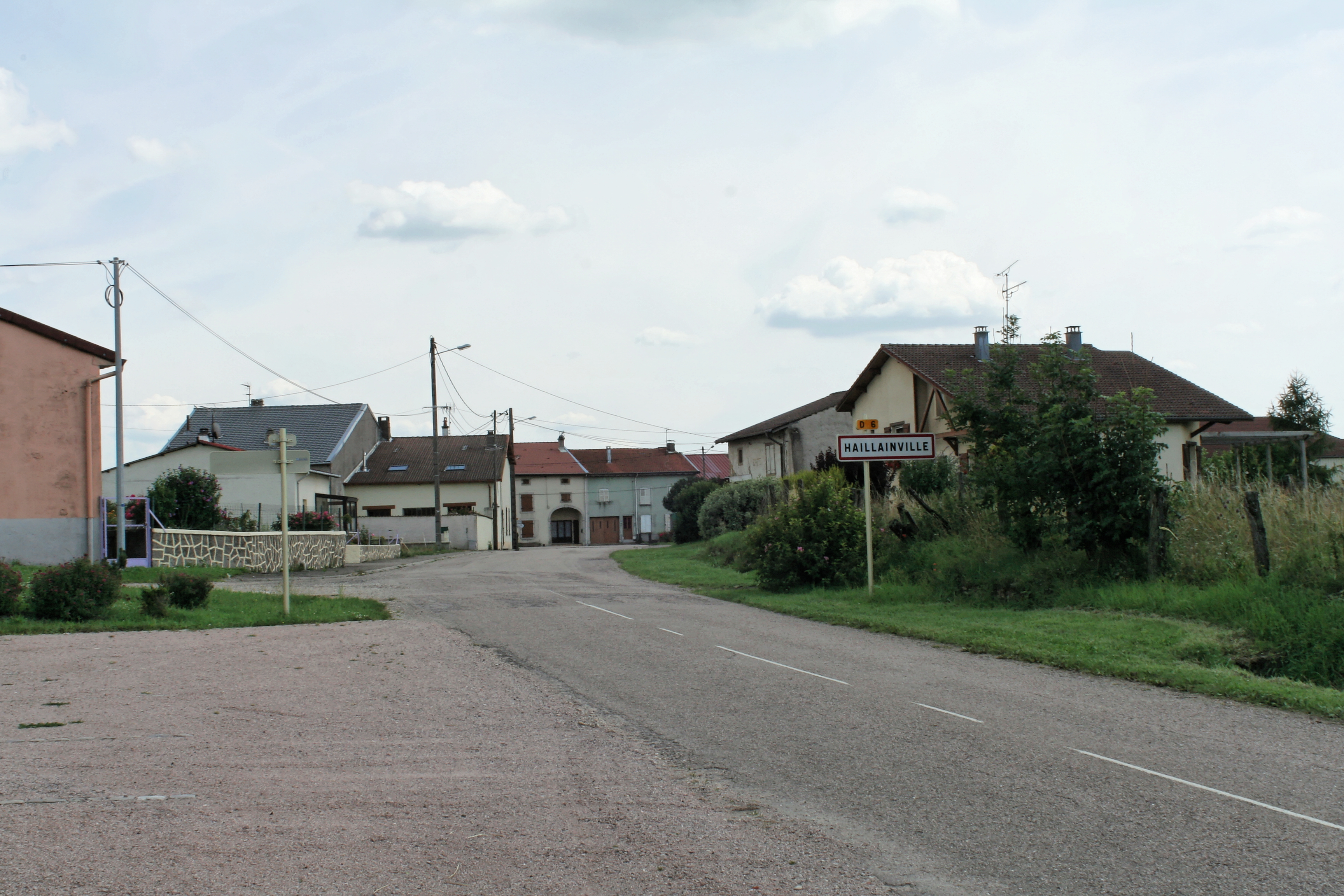 Entrée d'Haillainville (Vosges), par la route d'Essey.